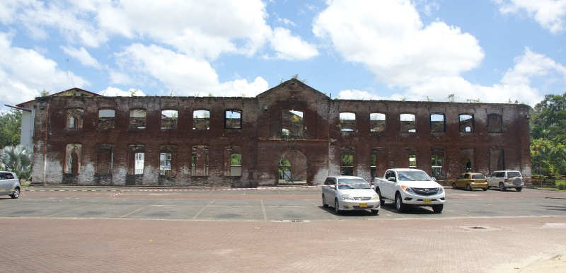 Zeelandiaweg 11, Paramaribo, Suriname